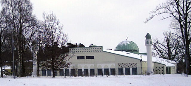 Trollhättans moské in Sweden